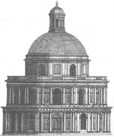 Elévation de la chapelle des valois - Projet idéal - 1563 - Le niveau supérieur de la coupole ne fut malheureusement jamais édifié , ce qui contribua à la ruine de la rotonde au cours du XVIIème siècle.